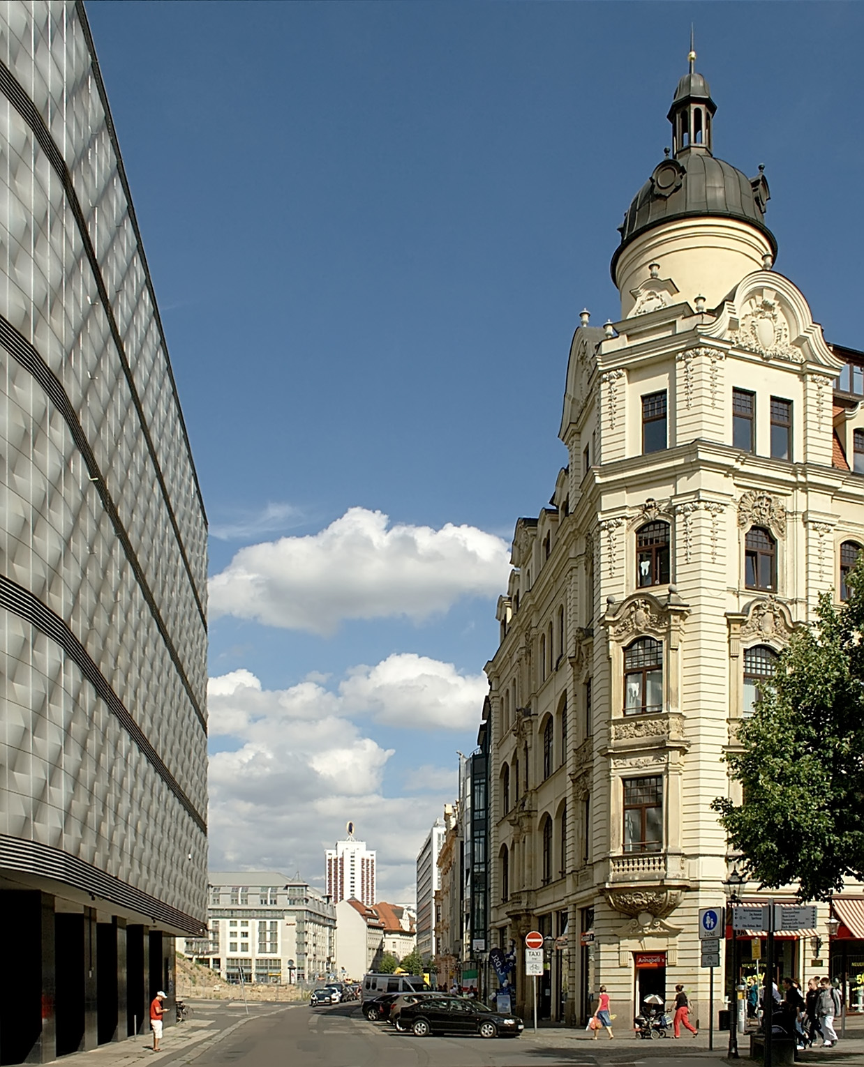 Der Brühl in Leipzig